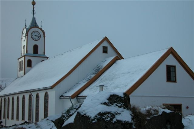 Die Tórshavner Domkirche im Winter